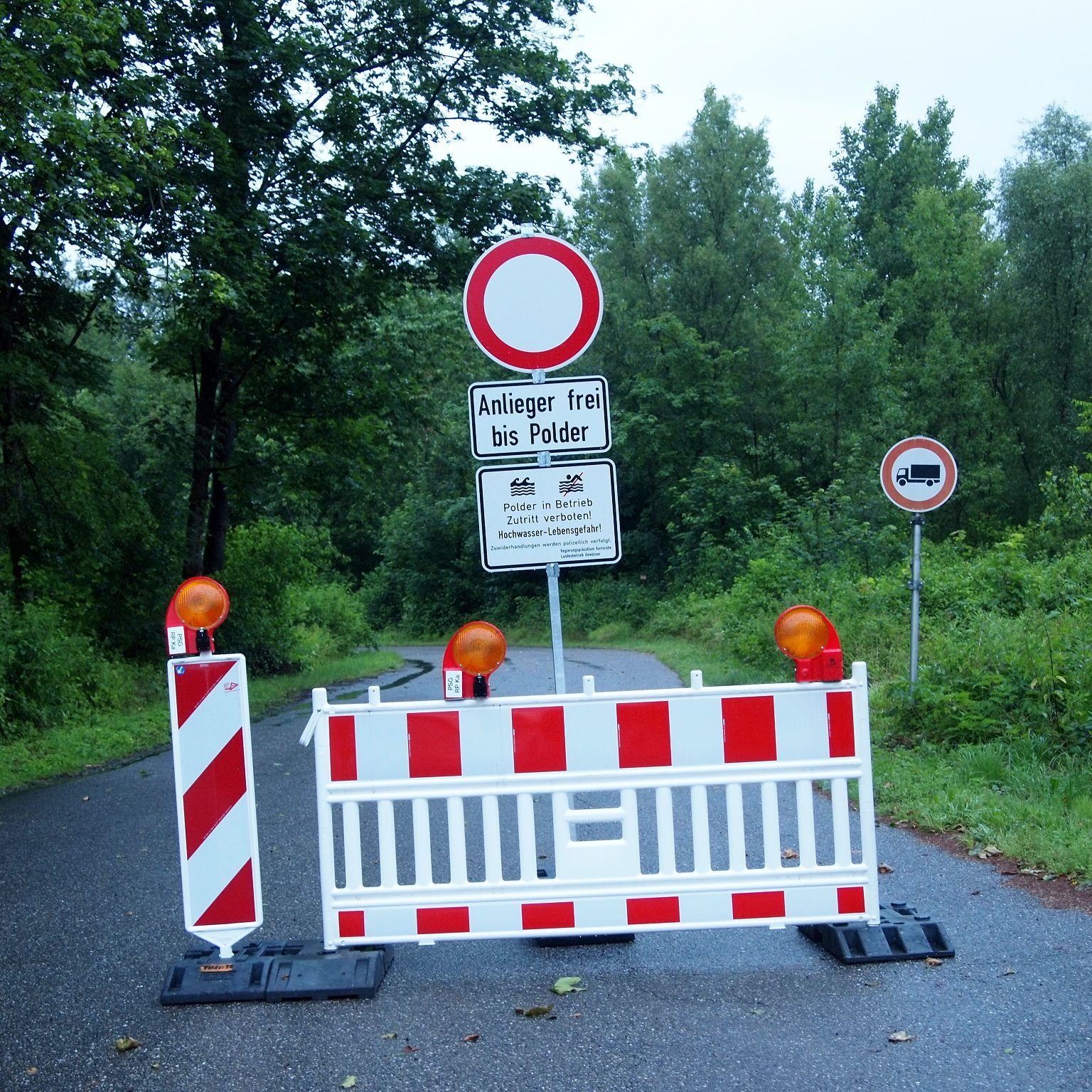 Verkehrszeichen „Durchfahrtverbot für Fahrzeuge aller Art“ mit Zusatzzeichen Anlieger frei bis Polder Polder in Betrieb Zutritt verboten! Hochwasser–Lebensgefahr!